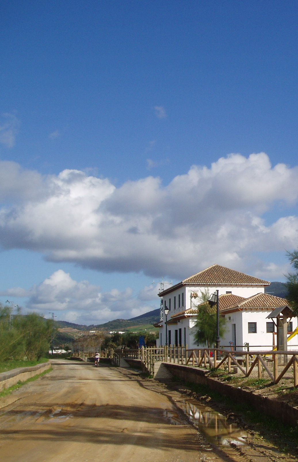 Estación de Puerto Serrano de la Vía Verde entre Puerto Serrano y Olvera. Aunque realmente es término municipal de El Coronil